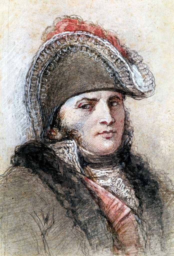 Portrait du maréchal Davout, prince d'Eckmühl (1770-1823). Dessin.